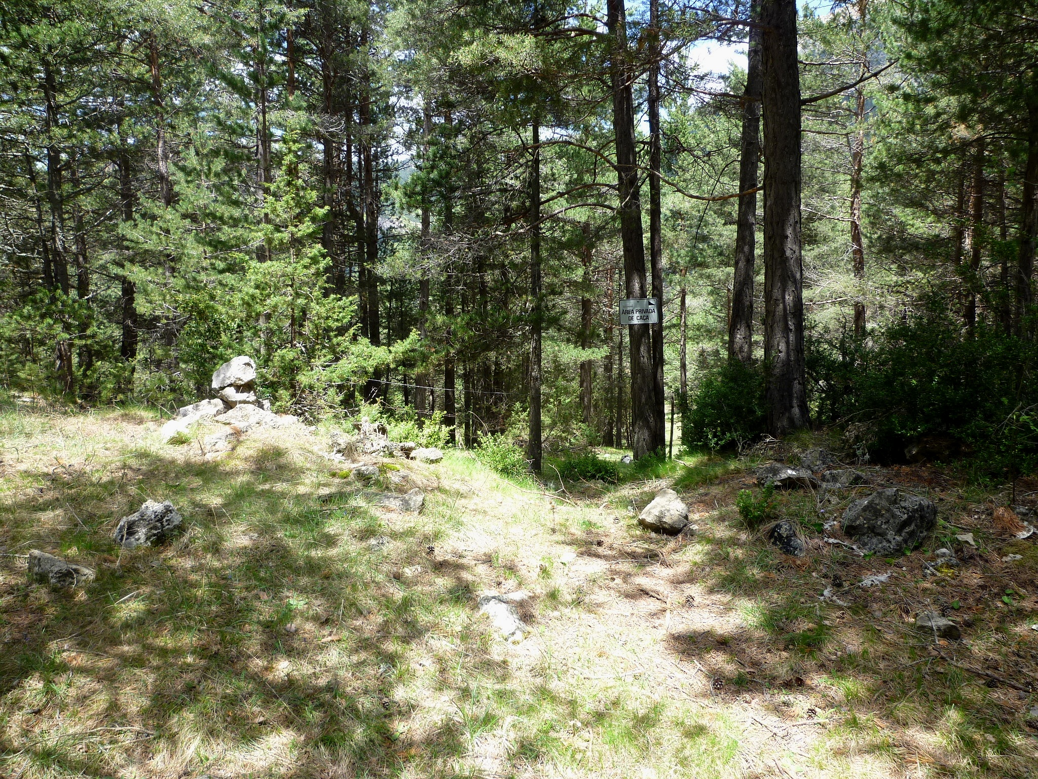 Sender al Coll dels Brulls, Serra del Verd. La Coma i la Pedra (Solsonès - Catalunya)